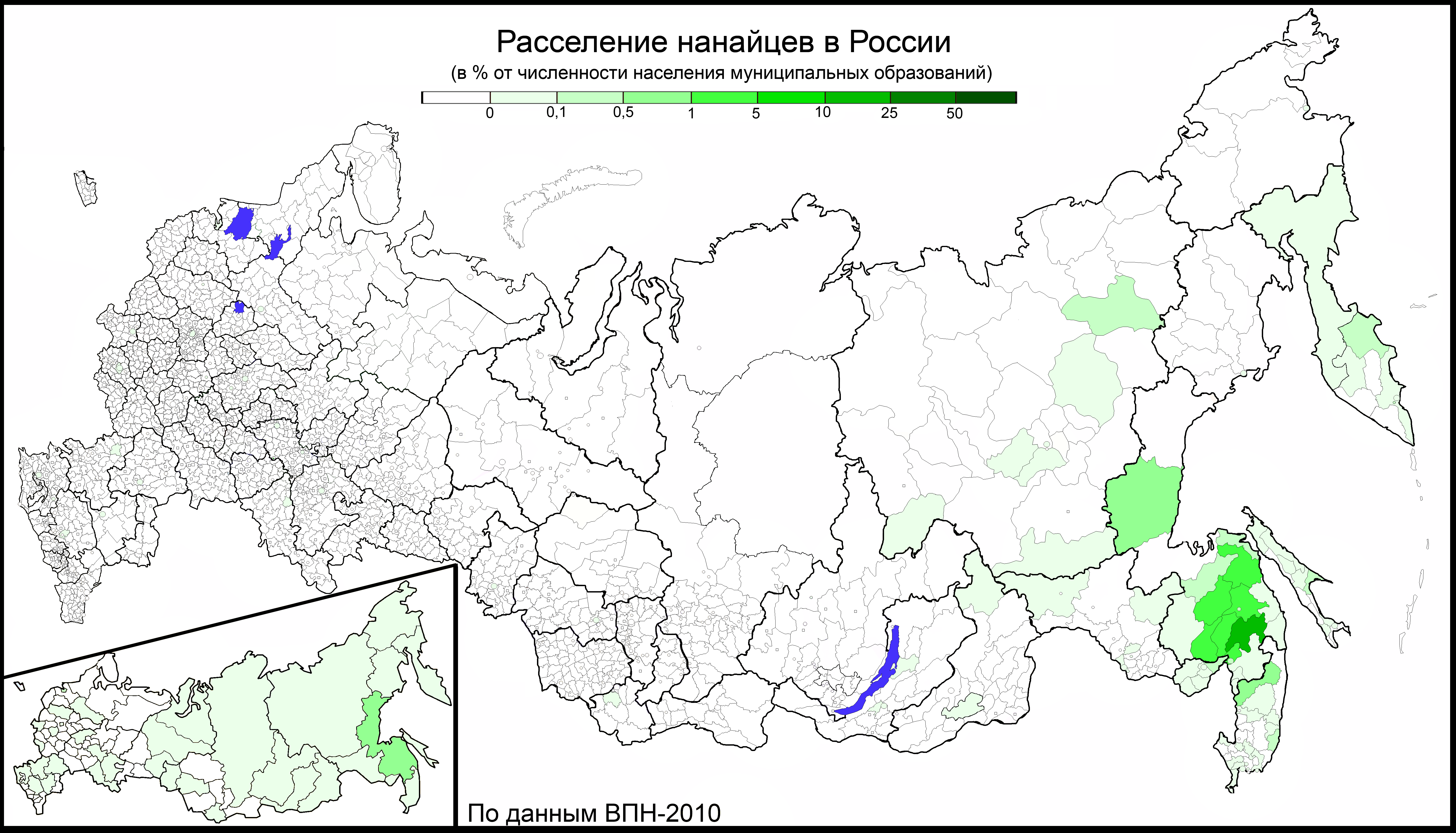 Расселение нанайцев в России по муниципальным районам и городским округам в % от численности населения соответствующих муниципальных образований. По переписи 2010 года